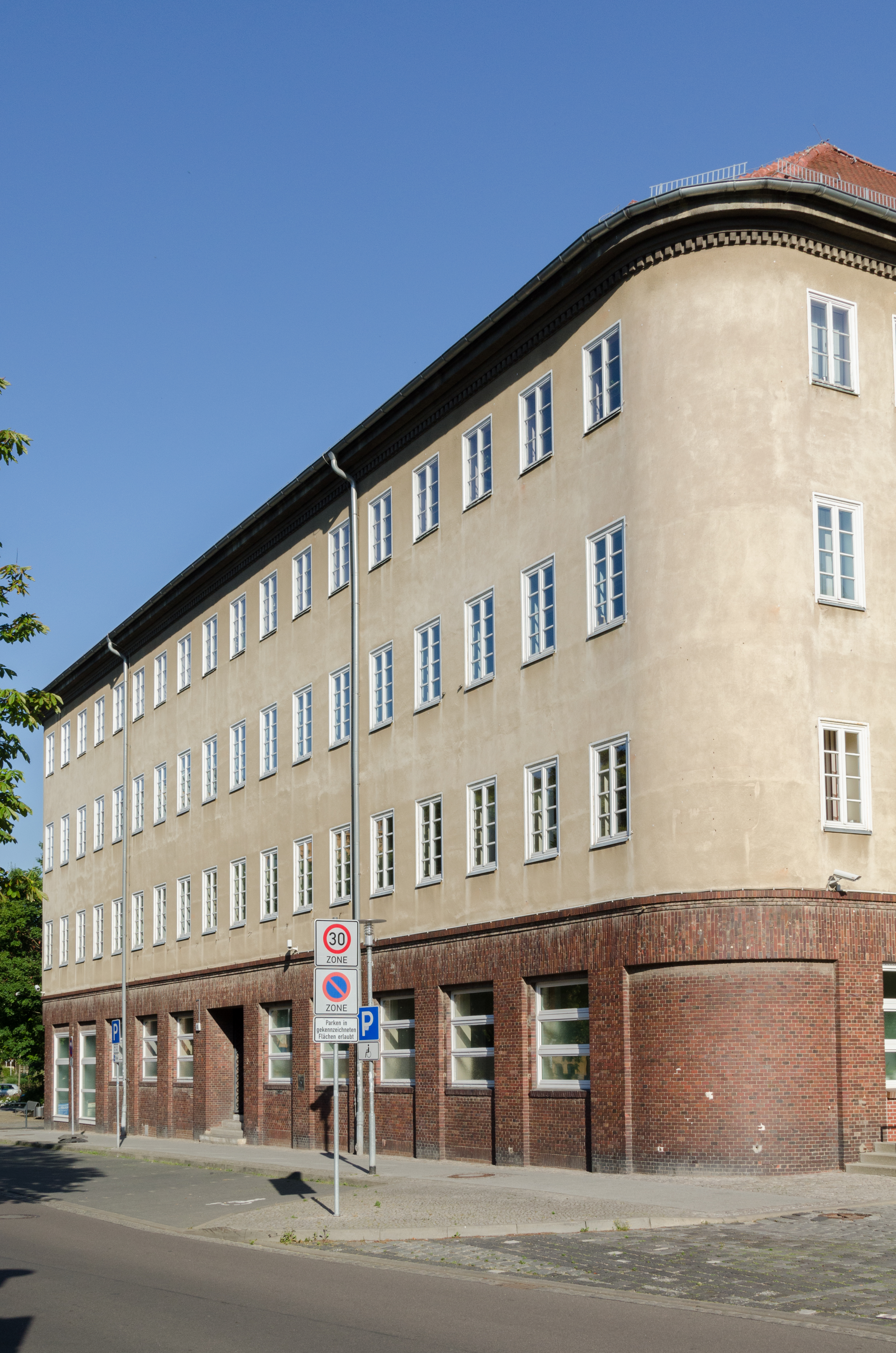 Merseburg, Bahnhofstraße 10